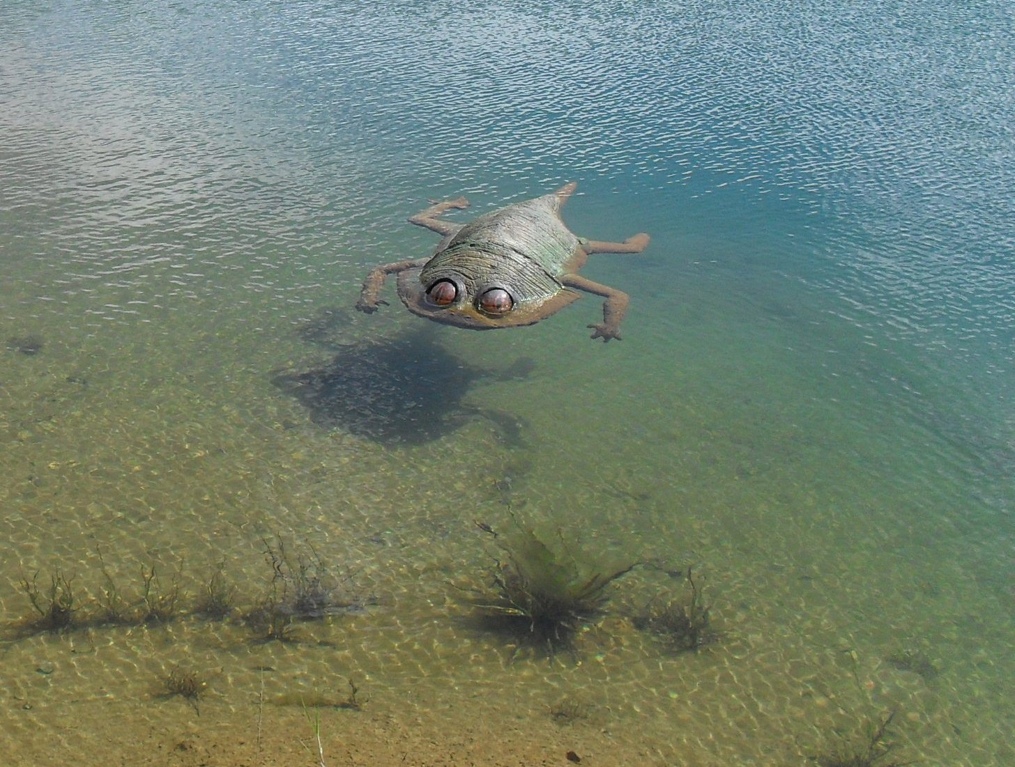 Gerrothorax en el Parque Temático Gondava, Sáchica, Boyacá, Colombia